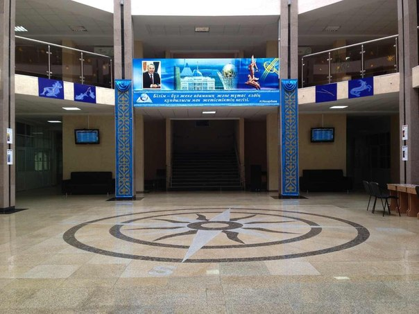 Көкшетау қаласындағы Назарбаев Зияткерлік мектебінің атриумы